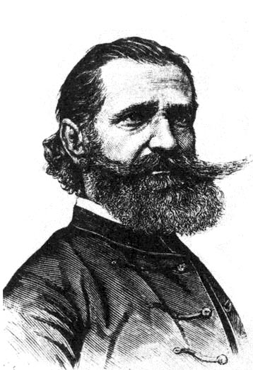 Orbán Balázs író, néprajzi gyűjtő, a Magyar Tudományos Akadémia levelező tagja (1887)